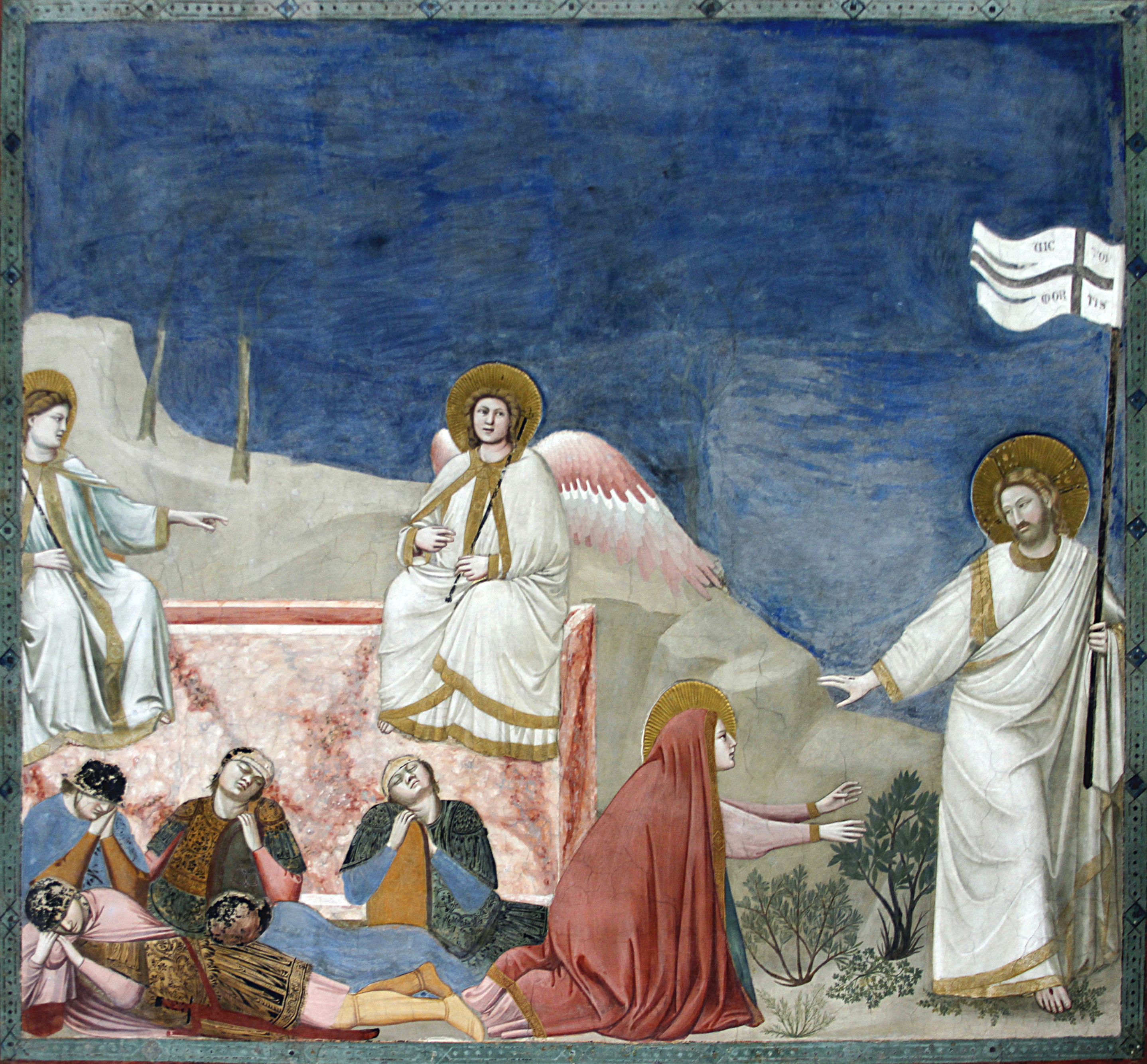 Capella dei Scrovegni - Padua